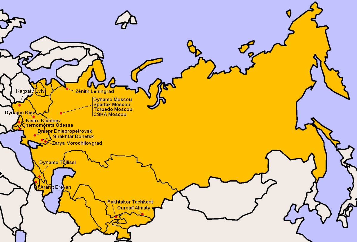 Clubs participants à la Division Supérieure 1974.